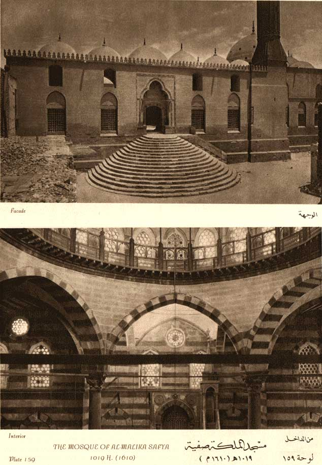 Safiye Sultan Kahire'de yaptırılan Melike Safiye Camii